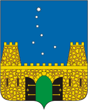 Герб Староминского района Краснодарского края